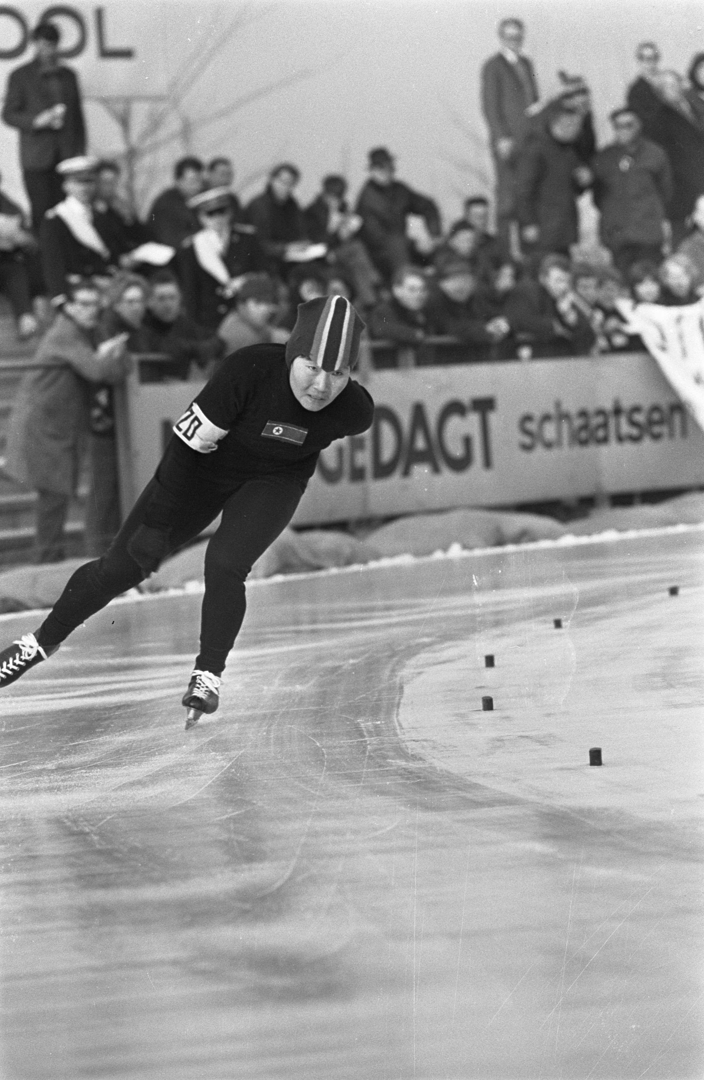 Collectie / Archief : Fotocollectie Anefo Reportage / Serie : [ onbekend ] Beschrijving : WK schaatsen te Deventer dames Datum : 18 februari 1967 Locatie : Deventer Trefwoorden : SCHAATSEN, sport Fotograaf : Kroon, Ron / Anefo Auteursrechthebbende : Nationaal Archief Materiaalsoort : Negatief (zwart/wit) Nummer archiefinventaris : bekijk toegang 2.24.01.05 Bestanddeelnummer : 920-0891